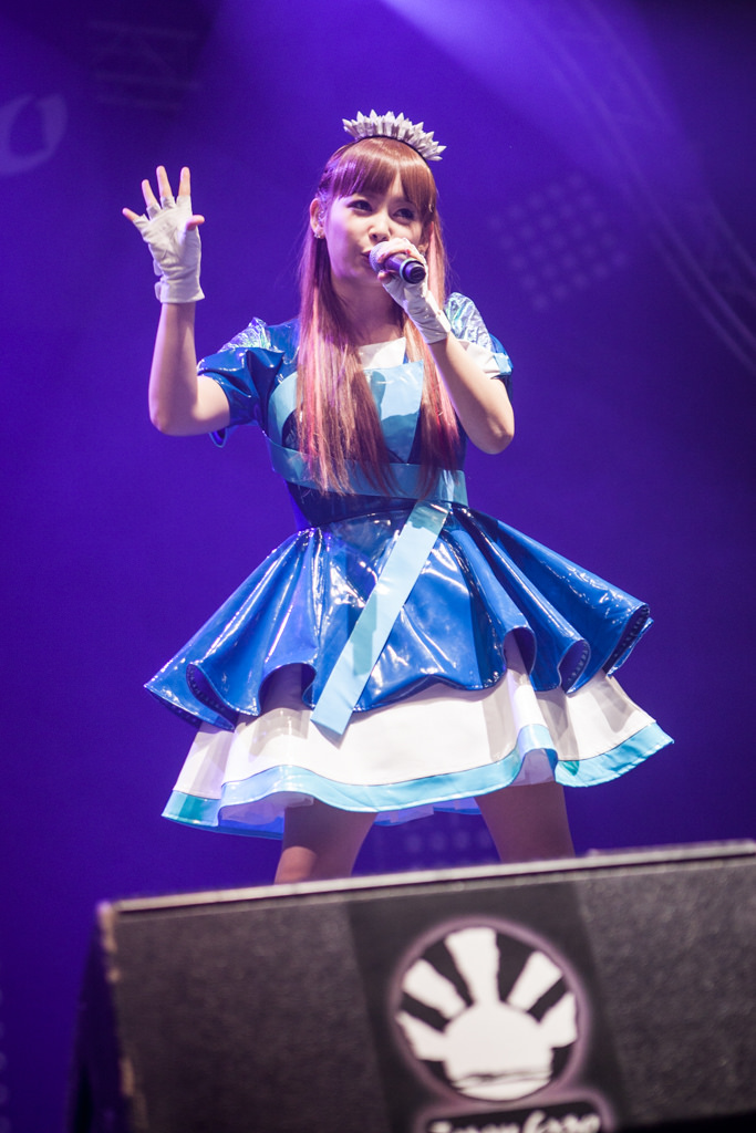 Shoko Nakagawa